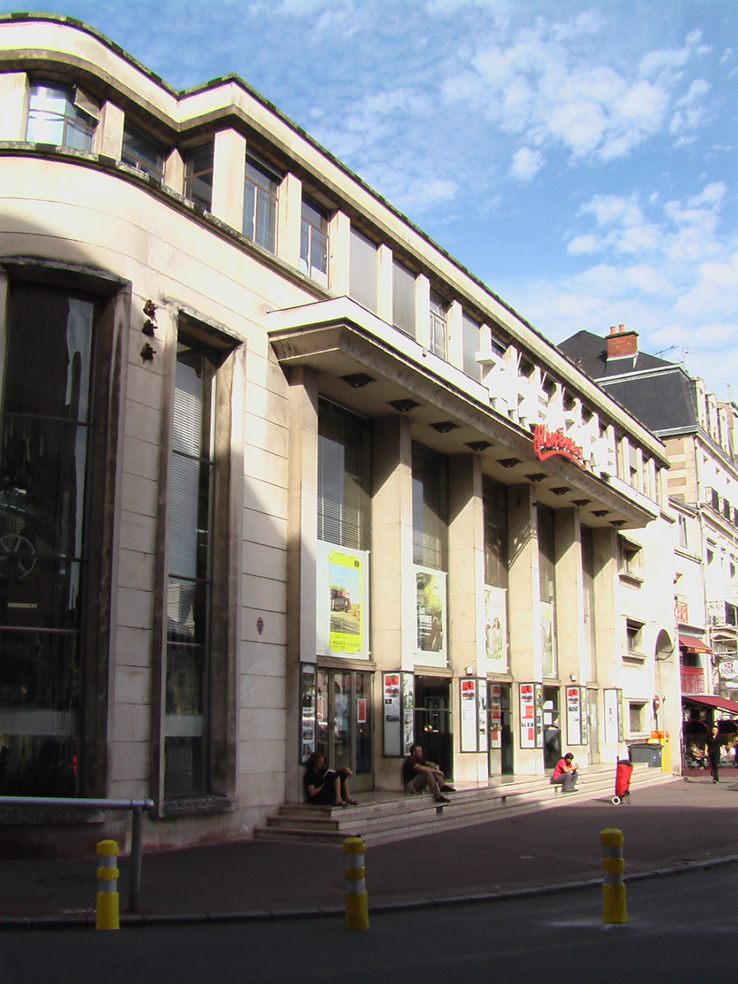 Ancien théâtre municipal de Poitiers, photo prise en 2011